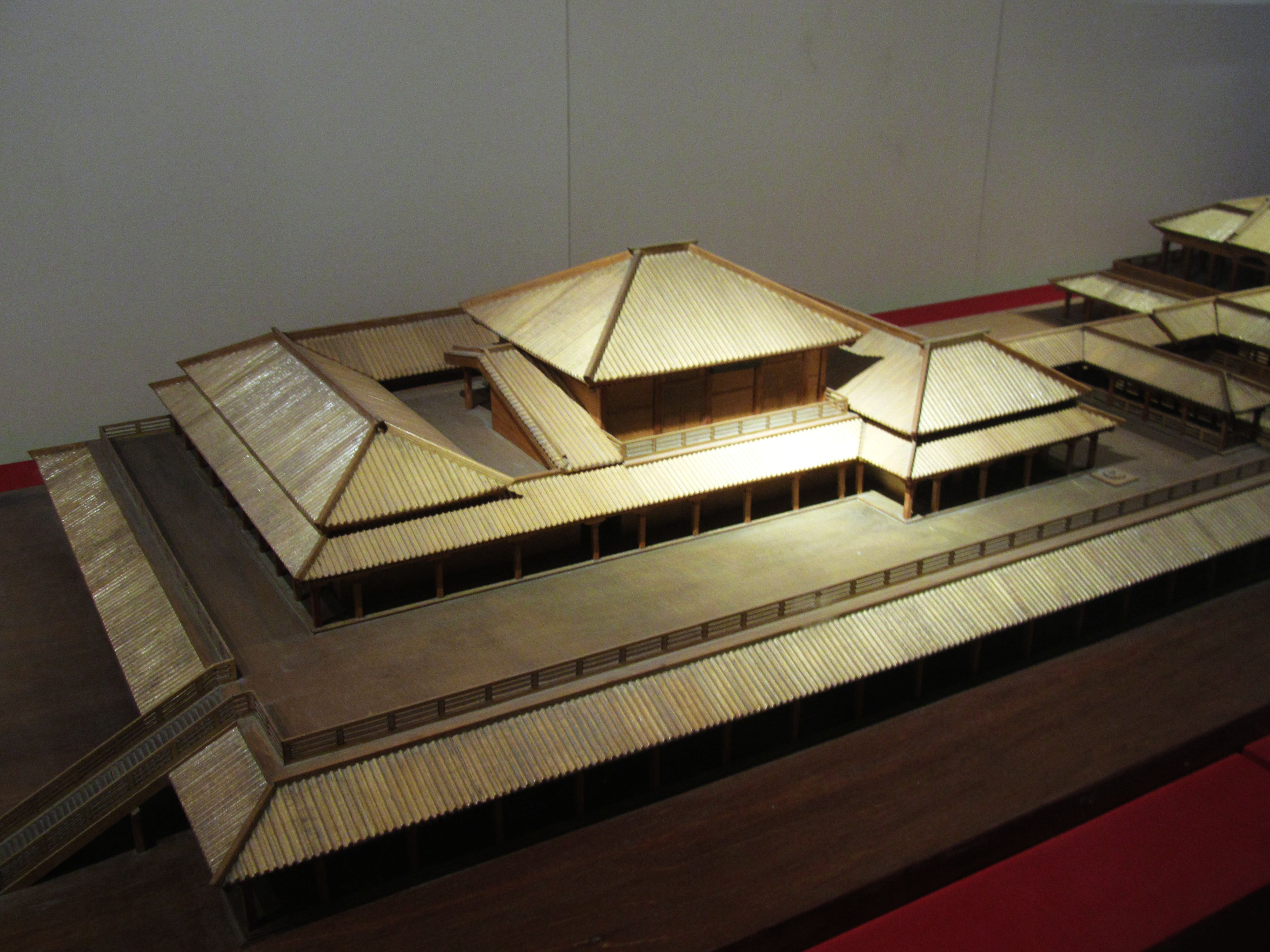 杨鸿勋据秦咸阳宫一号宫殿考古遗址所复原的建筑模型 。